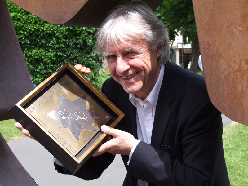 Emil Steinberger erhält einen "Stern der Satiere" auf dem "Walk of Fame des Kabaretts" in Mainz, Sterne der Satire – Walk of Fame des Kabaretts